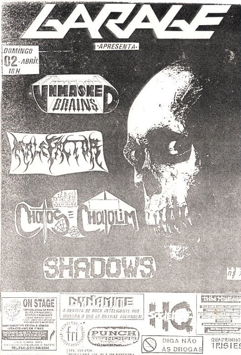 Cópia escaneada de cartaz montado usando logos fornecidos pelas bandas e figuras de fundo diversas, para divulgar shows do Garage Art Cult. A mais comum é papel quadriculado ou milimetrado. O trabalho era todo feito à mão, às vezes pelo próprio Fabio Costa, às vezes por outra pessoa ligada à casa de shows.